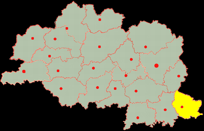 Vitebsk-obl-Dubrovno region